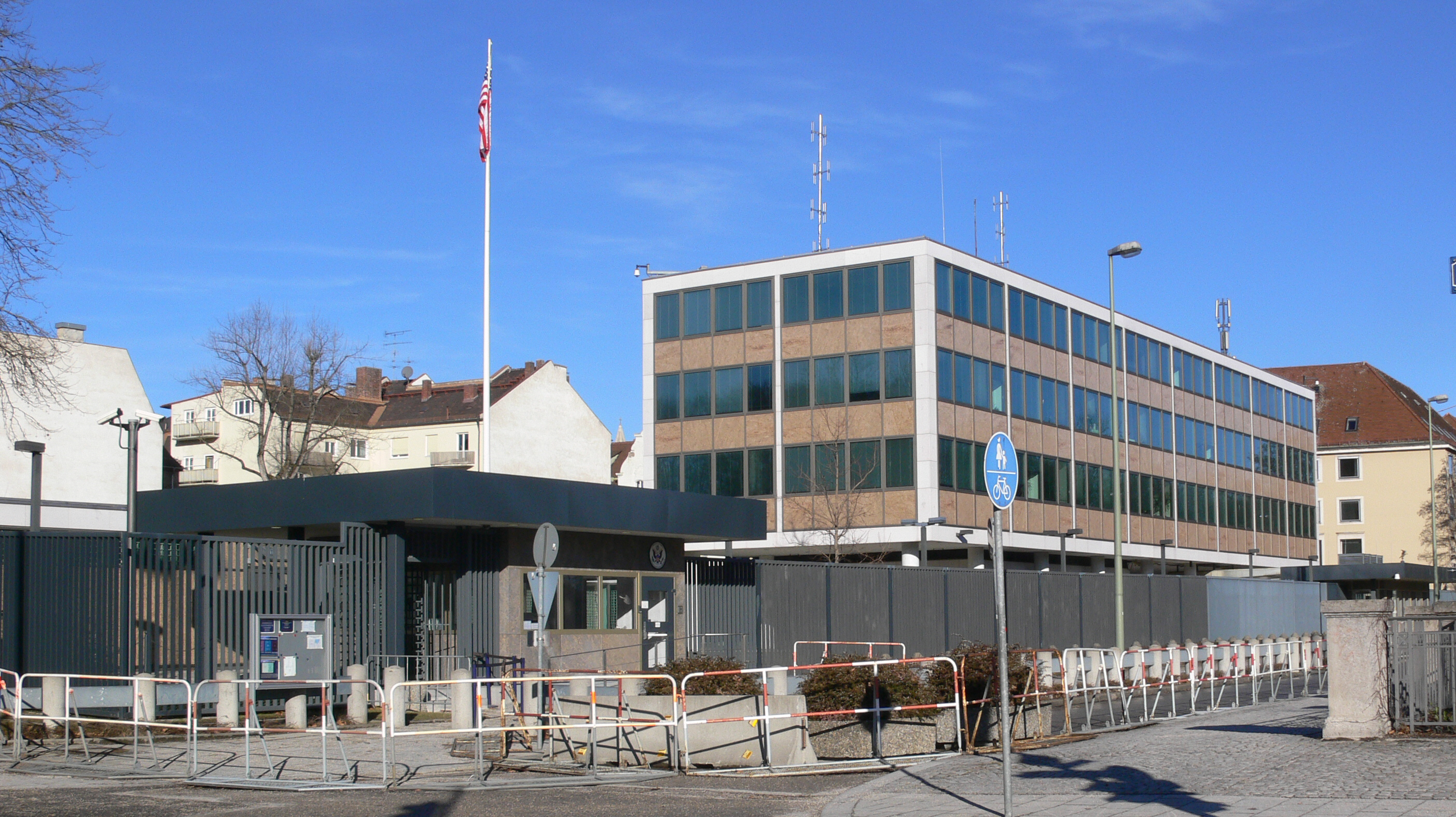 München, Generalkonulat der USA, Königstraße